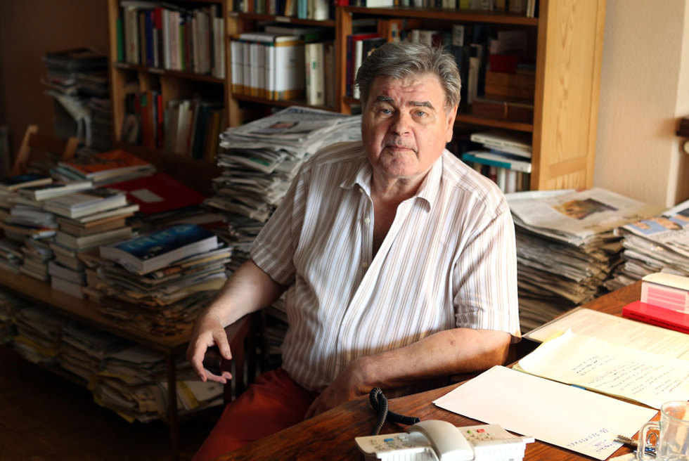 WalterHaubrich